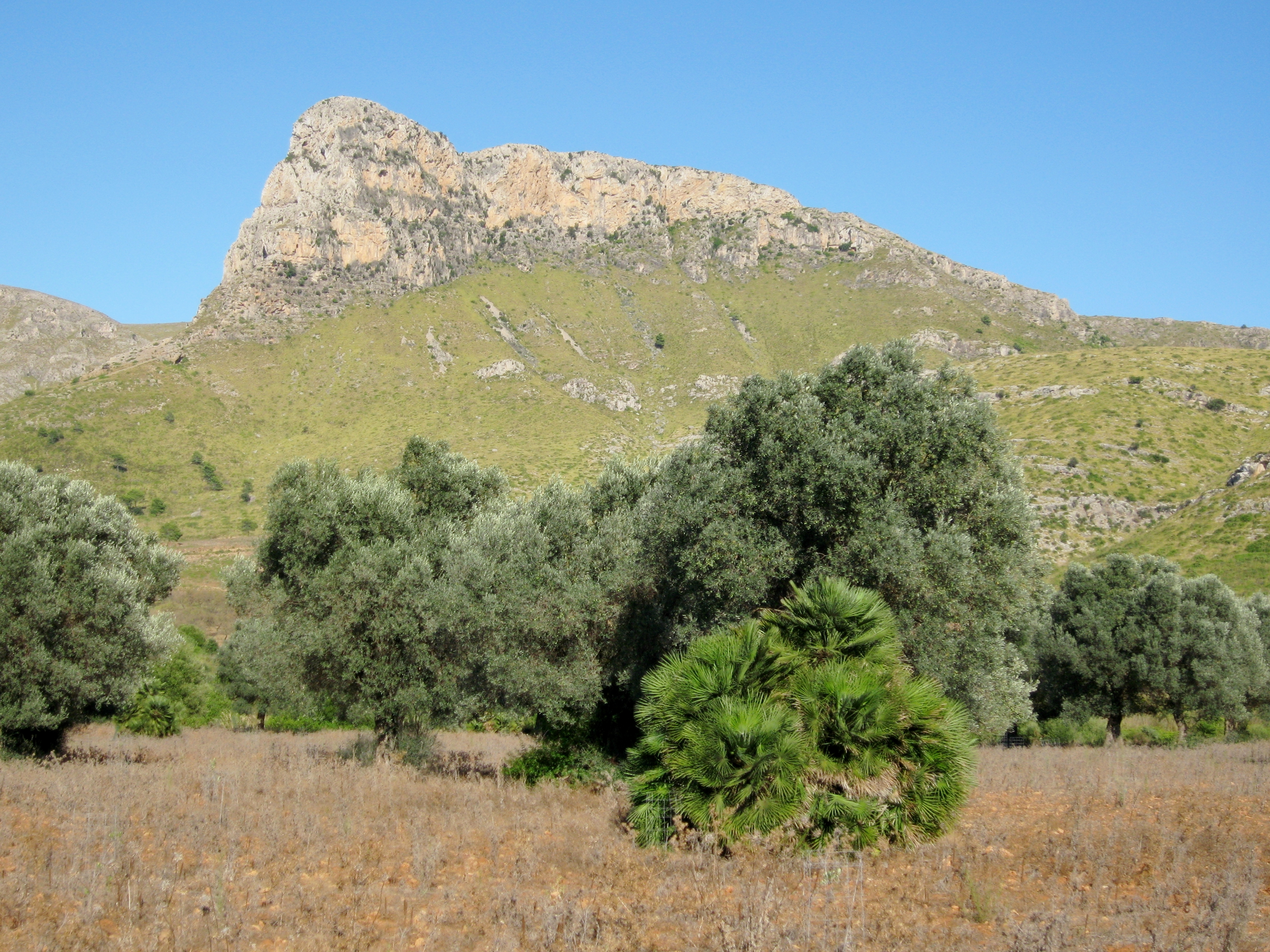 Der Puig de Ferrutx („Berg von Ferrutx“), Massís d’Artà, Serres de Llevant, Mallorca, Spanien